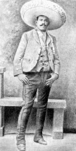 Zapatista Gral. Amador Salazar Jimenez.